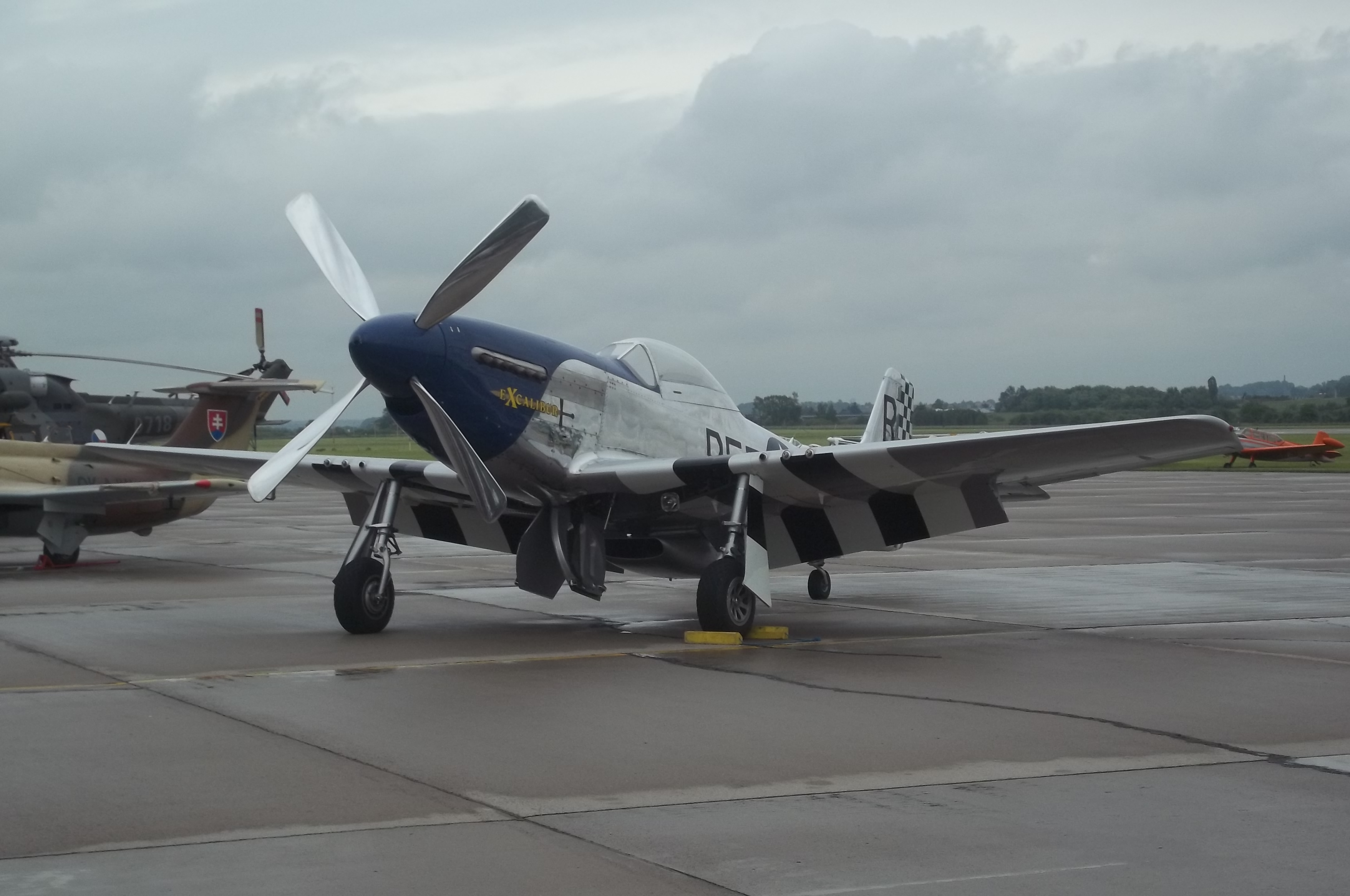 North American P-51 Mustang D